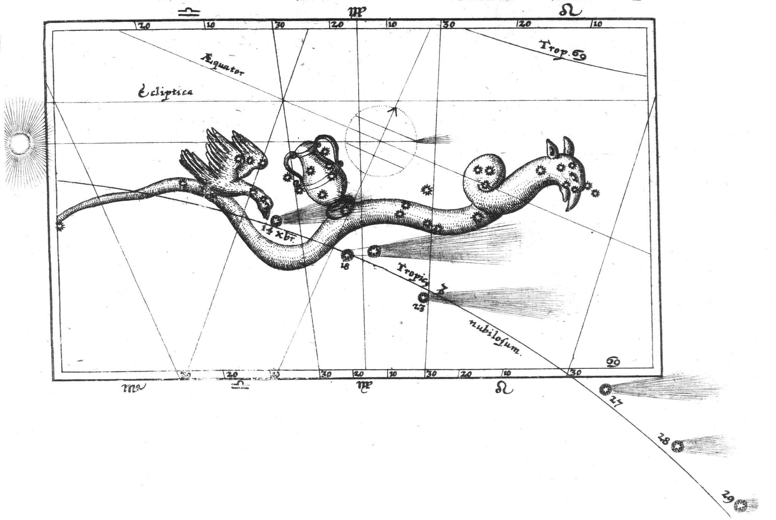 Scan of Leaflet / Eines Einblattdruckes Kurtzer Bericht von dem Cometen.jpg